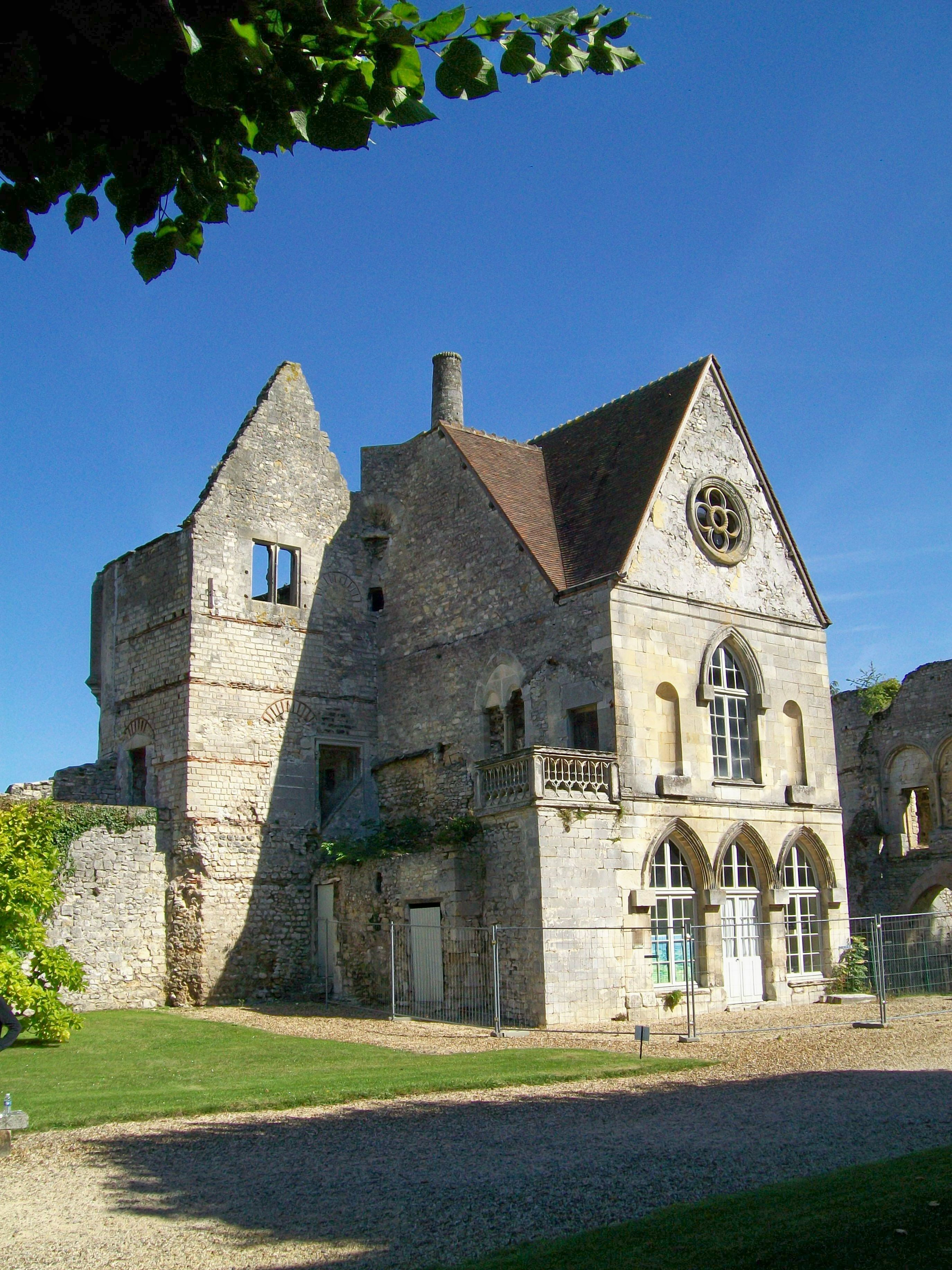 Le corps de bâtiments le plus occidental, avec les anciens appartements privés du roi (mur pignon néogothique de 1861) et la tour de l'Oratoire, tour n° 28 de l'enceinte gallo-romaine. Un oratoire y a été aménagé par Charles V. - En place de la façade néogothique, le bâtiment se poursuivait donc vers le sud jusqu'en 1861 ; cette aile faisant équerre avec le palais avait abrité l'administration des Eaux et Forêts sous l'Ancien Régime.